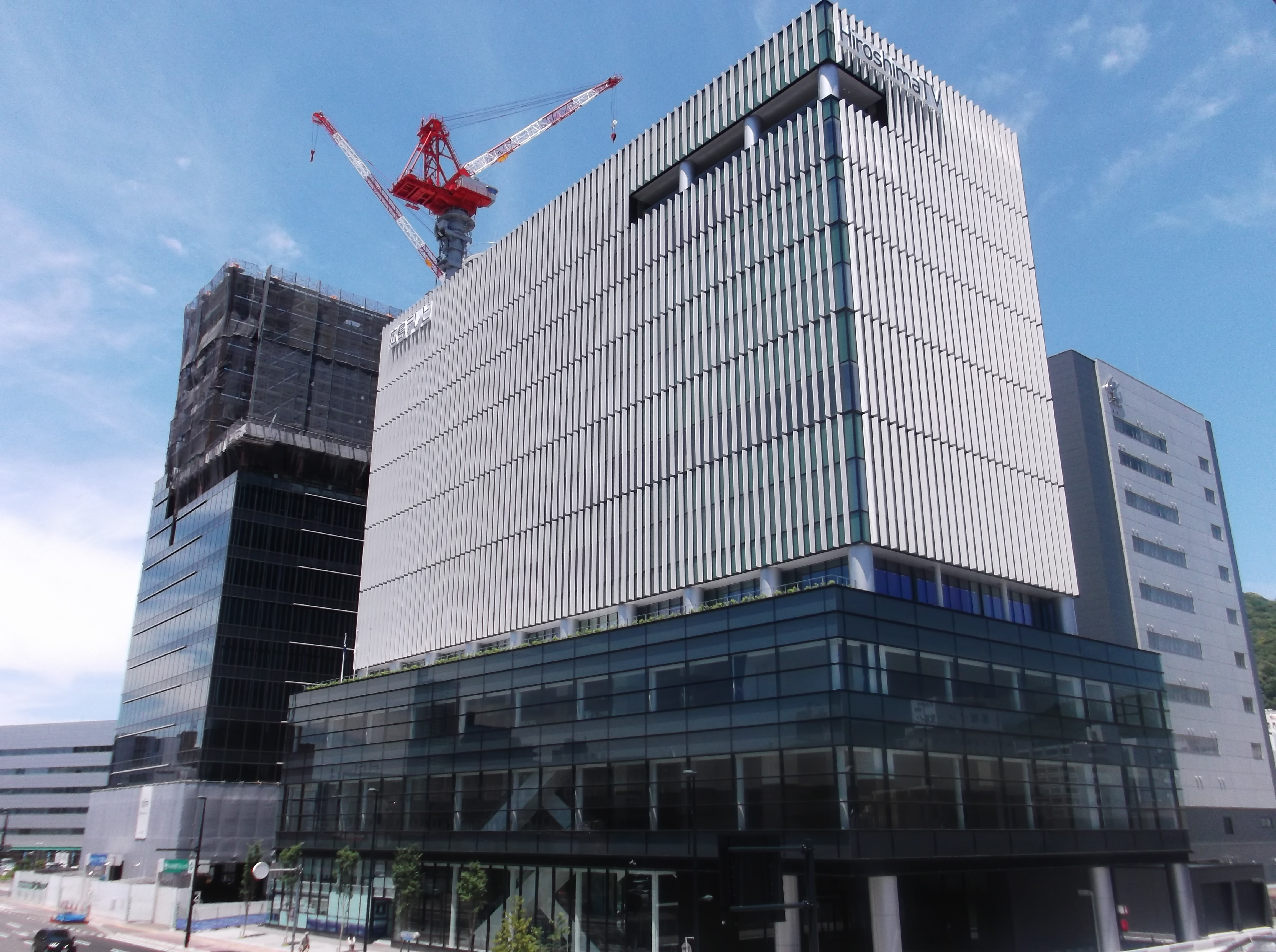 2018年3月に完成した広島テレビ新社屋。